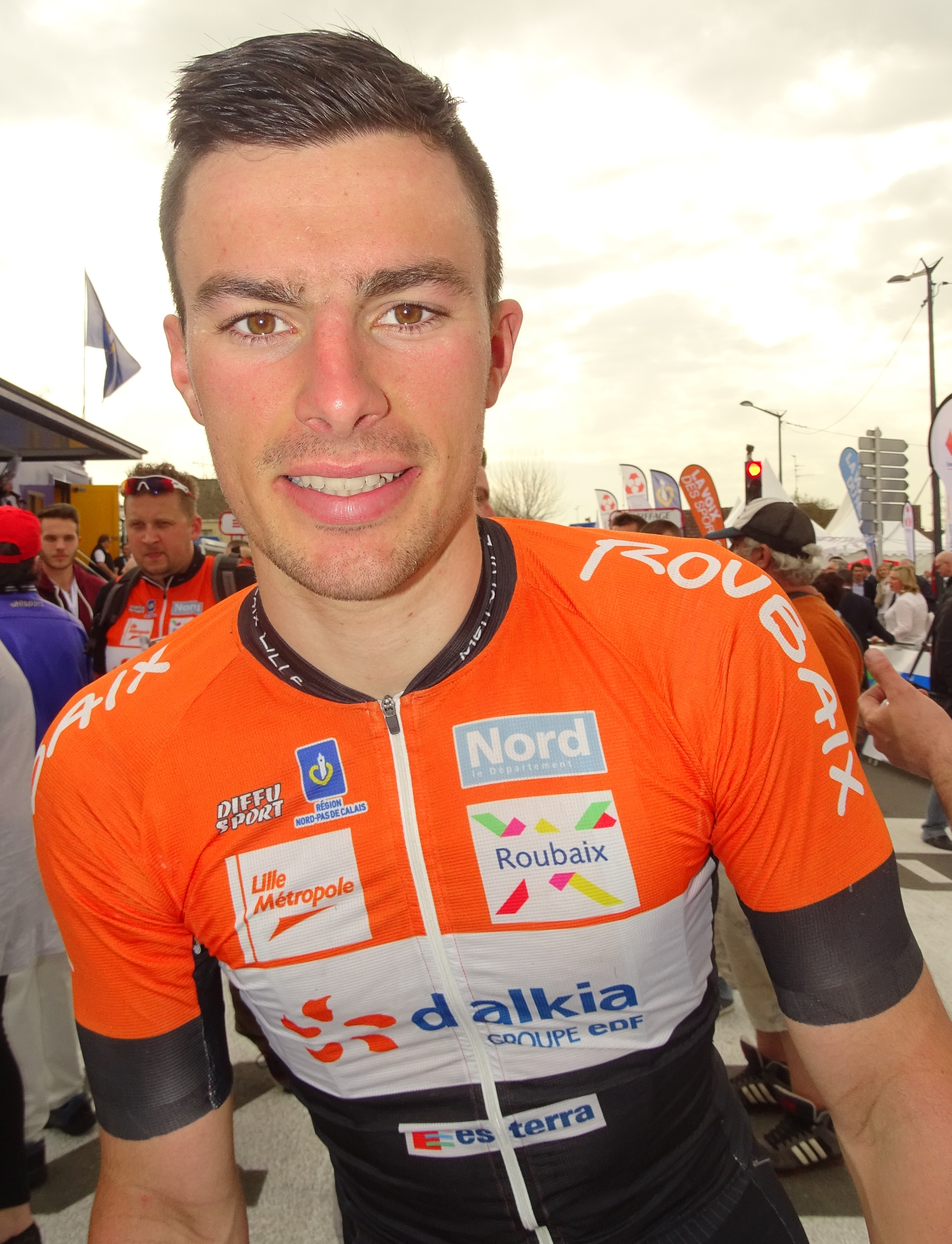 Reportage réalisé le jeudi 16 avril à l'occasion du départ et de l'arrivée du Grand Prix de Denain 2015 à Denain, Nord, Nord-Pas-de-Calais, France.